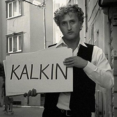 Tarkan Çakır'ın 2013 yılında yayınlanmış olan Kalkın isimli tekli albüm kapağı.